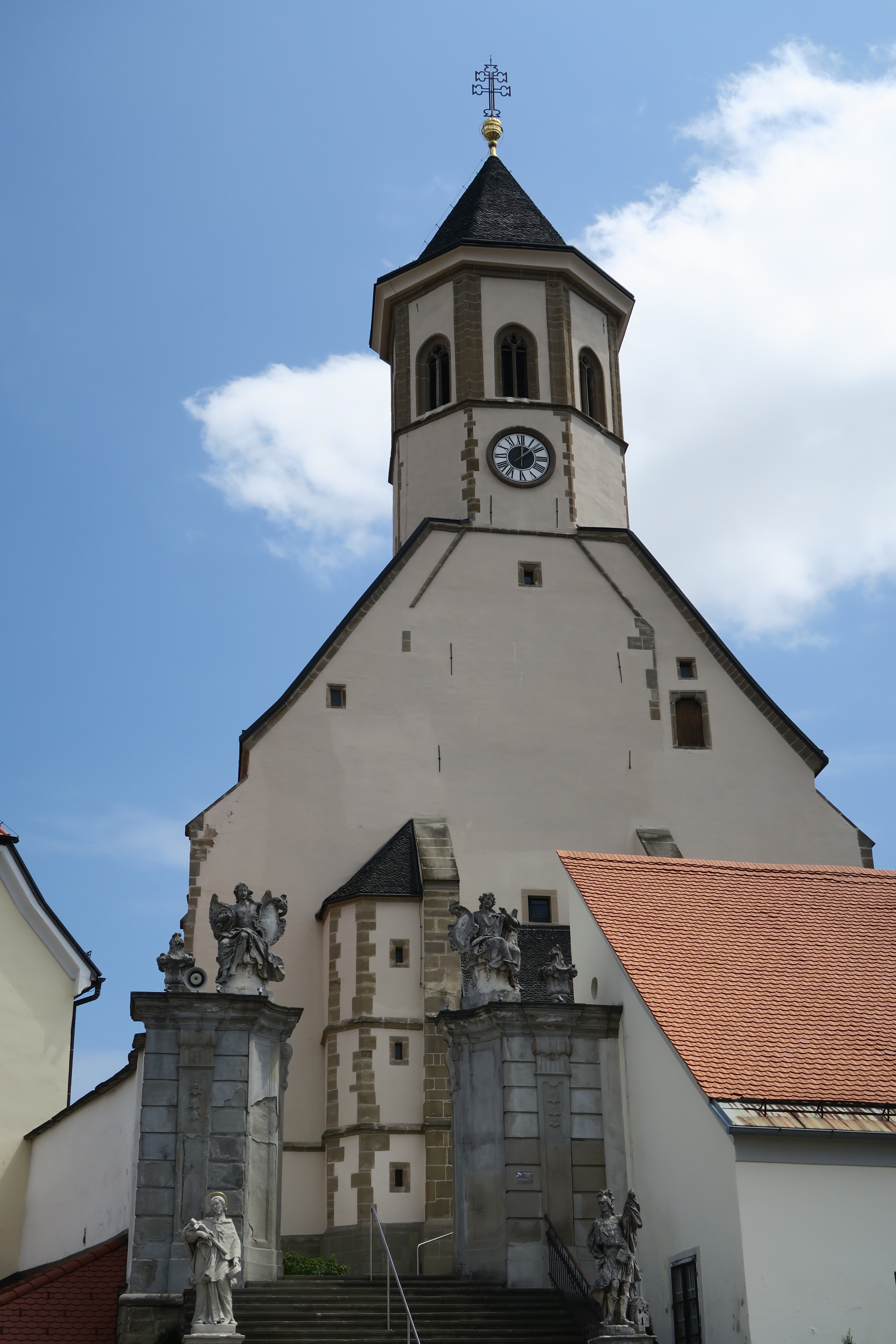 Basilika Ptujska Gora Slowenien